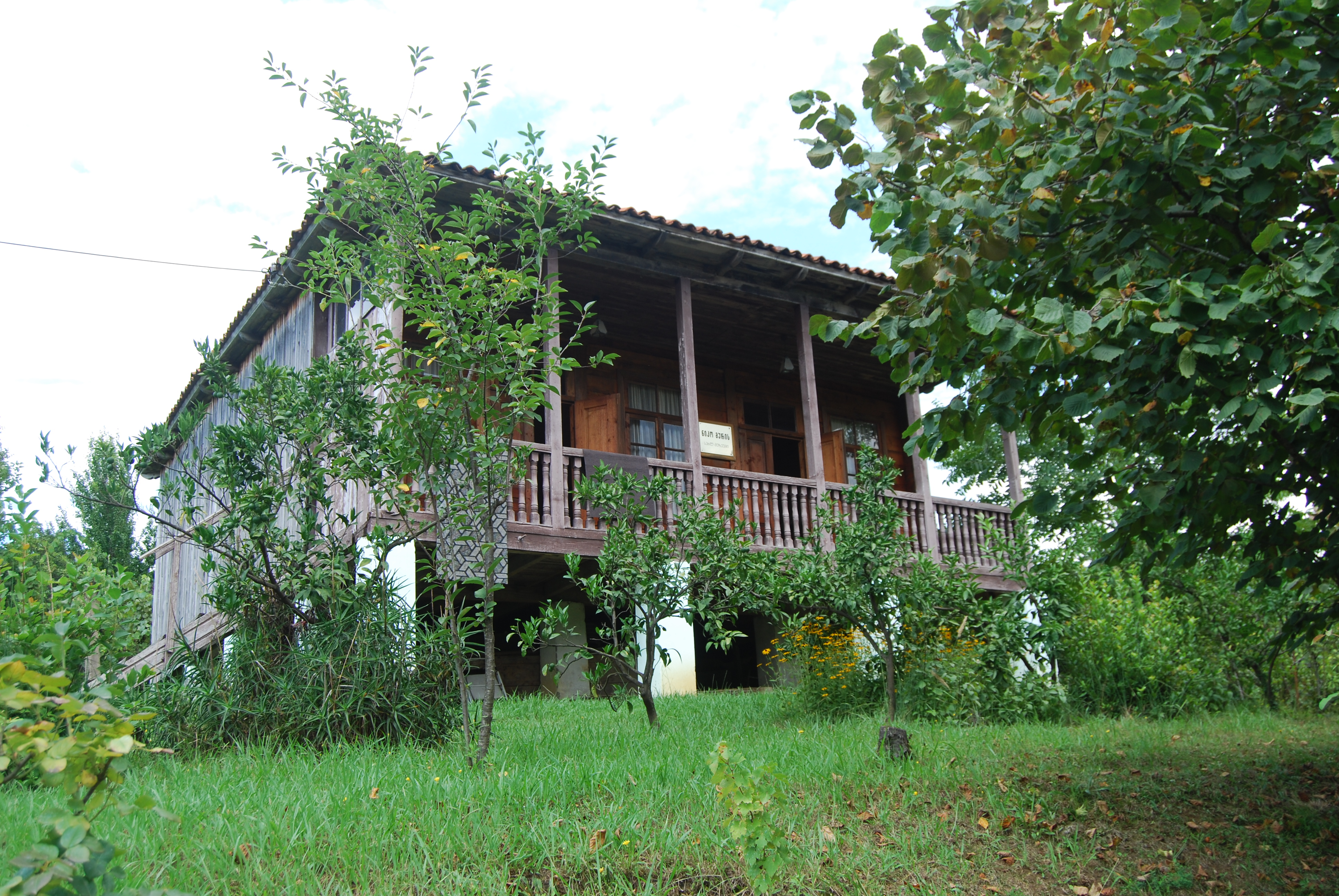 ნიკო მარის მუზეუმი